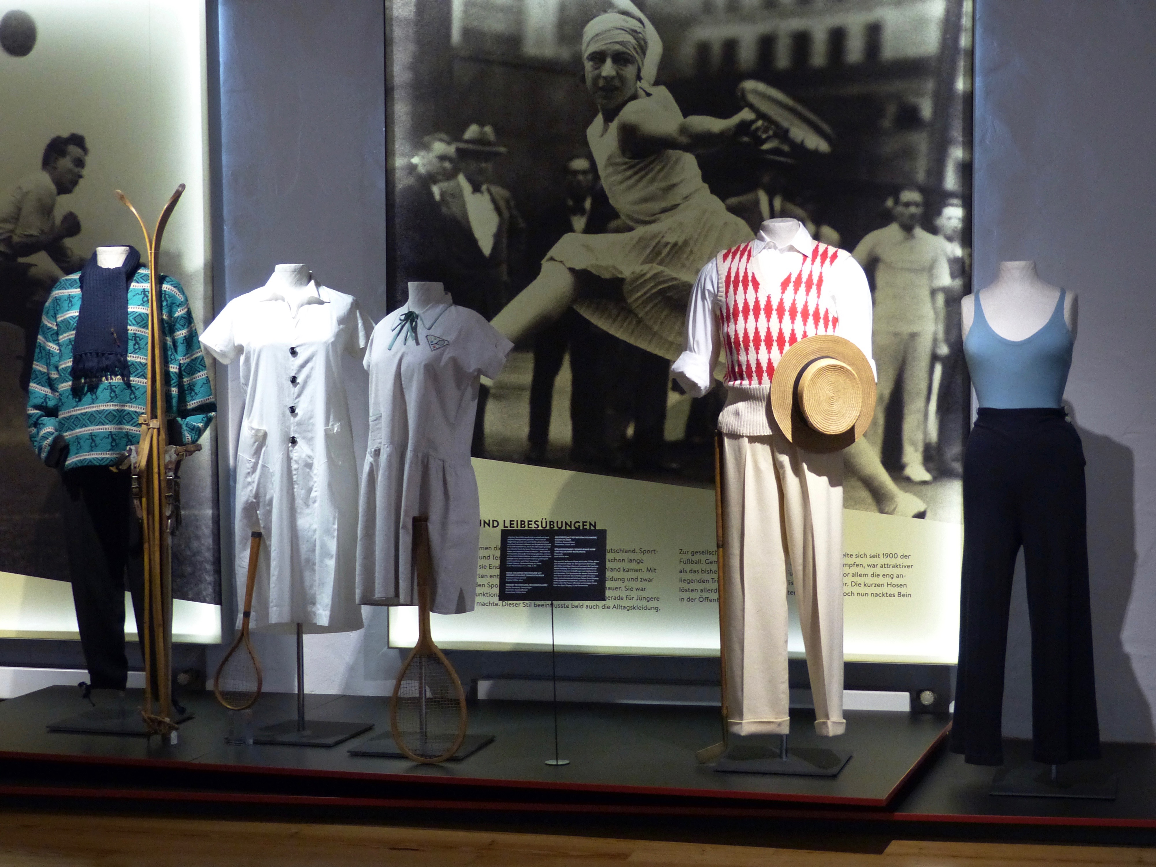 Sonderaustellung Macht der Mode: Blick in die Ausstellung - Sportmode in den 1920er Jahren GLAM-on-Tour: Industriemuseum Textilfabrik Cromford in Ratingen 2016 Wikipedianer fotografieren vom 10.–12. Juni 2016 die Exponate der Ausstellung „Die Macht der Mode“ im Industriemuseum Textilfabrik Cromford. This photo was taken during a project supported by WMDE.